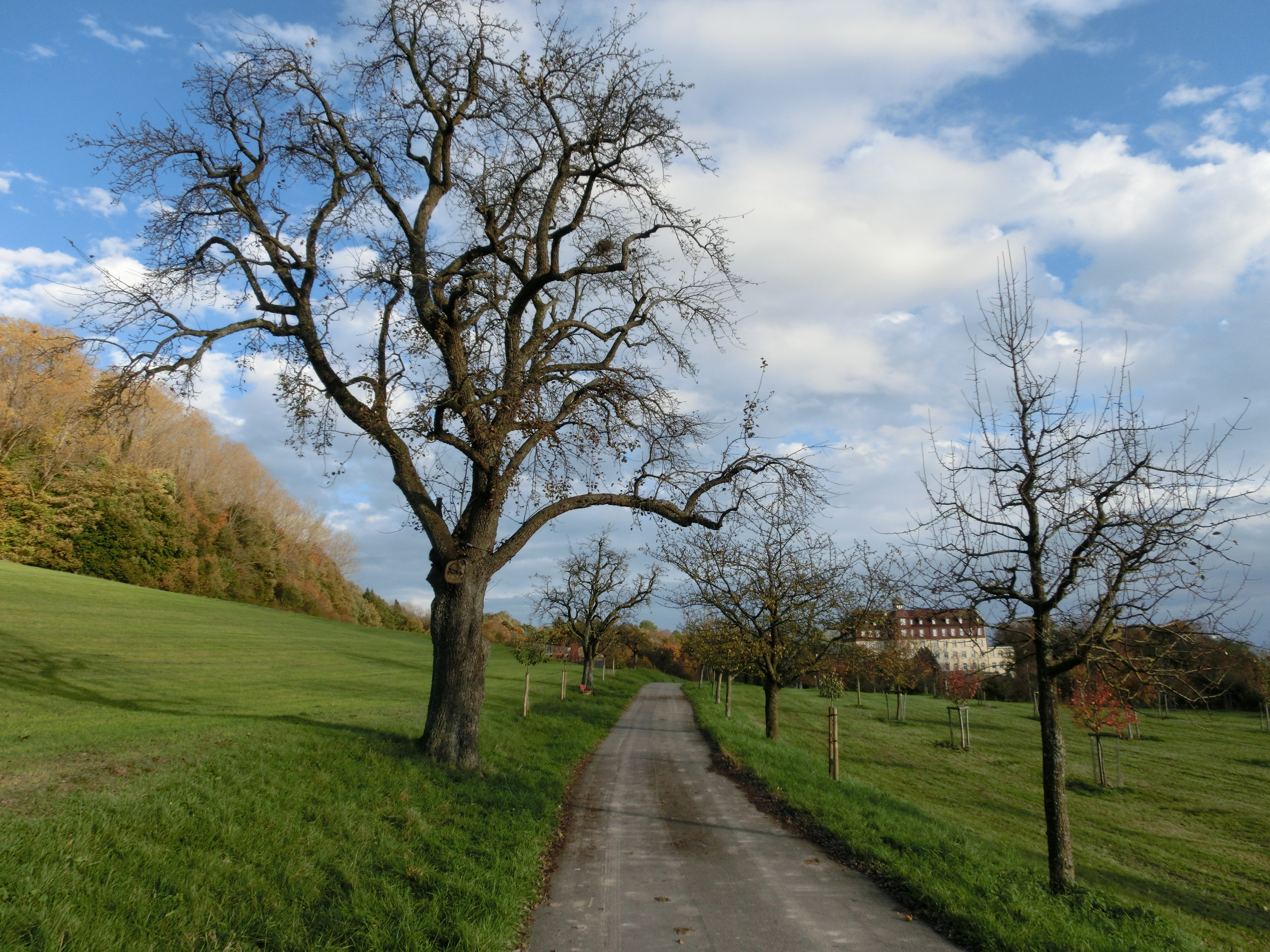 Deutschland - Baden-Württemberg - Bodenseekreis - Überlingen: Wanderweg zwischen Hödingen und Spetzgart